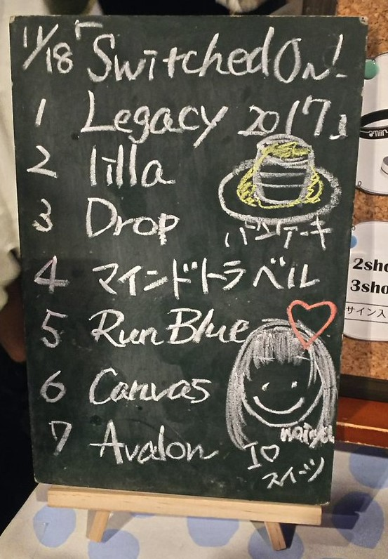 amiinAセトリボード(20171118(1))